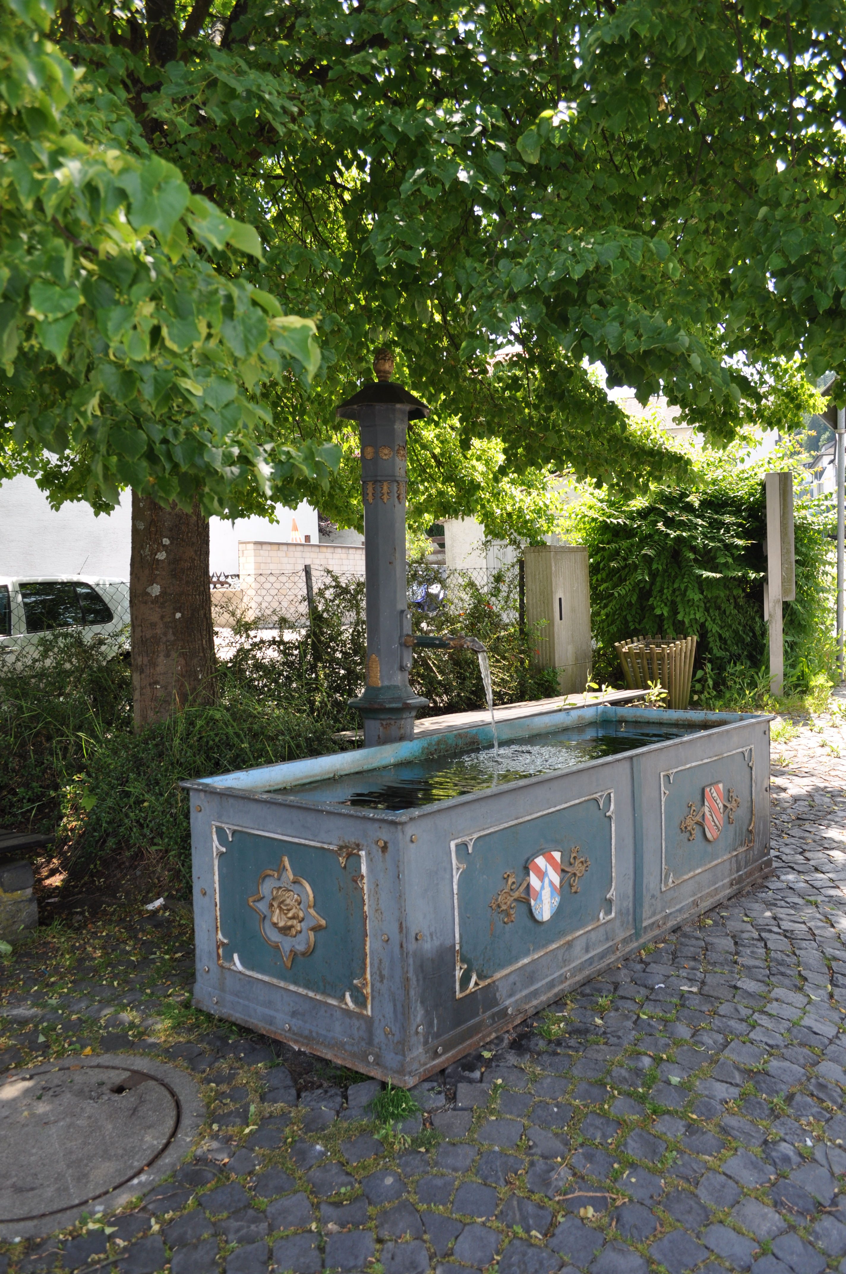 Gusseisener Brunnen in Niederreifenberg